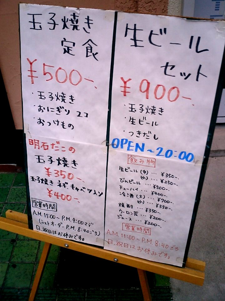 Tamagoyaki(akashiyaki)_on_the_menu